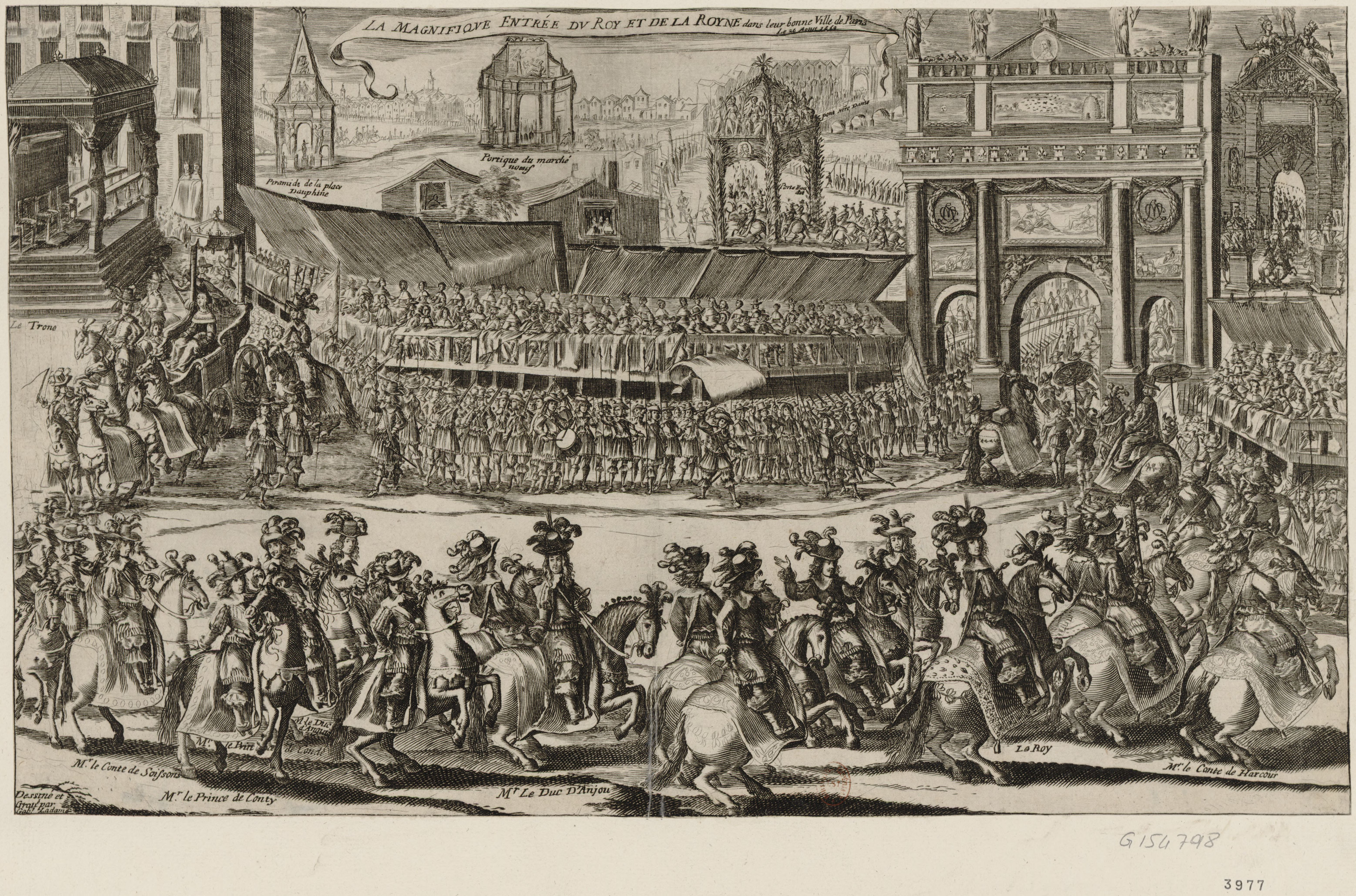 La magnifique entrée du Roy et de la Royne dans leur bonne ville de Paris le 26 aout 1660. Auteur : Ladame, Gabriel (1613?-1682?). Graveur Identifiant : ark:/12148/btv1b8404577k Source : Bibliothèque nationale de France, département Estampes et photographie, RESERVE QB-201 (44)-FOL Notice du catalogue : Notice de recueil : Relation : Appartient à : [Recueil. Collection Michel Hennin. Estampes relatives à l'Histoire de France. Tome 44, Pièces 3974-4028, période : 1660] Notice du catalogue : Provenance : Bibliothèque nationale de France